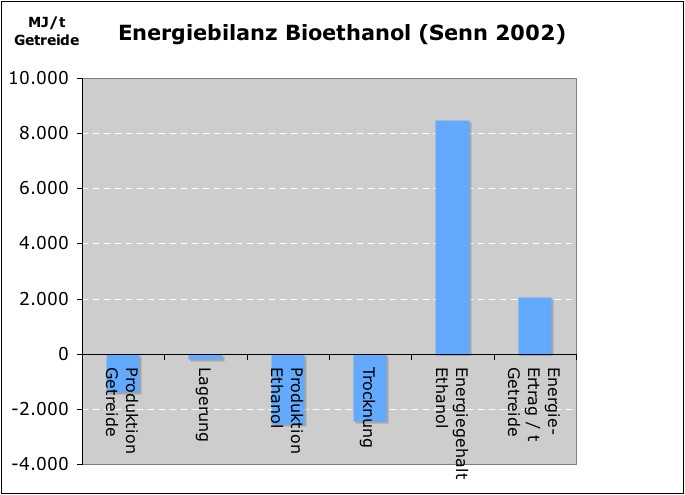 Energiebilanz bei Bioethanol nach Senn 2002, Download